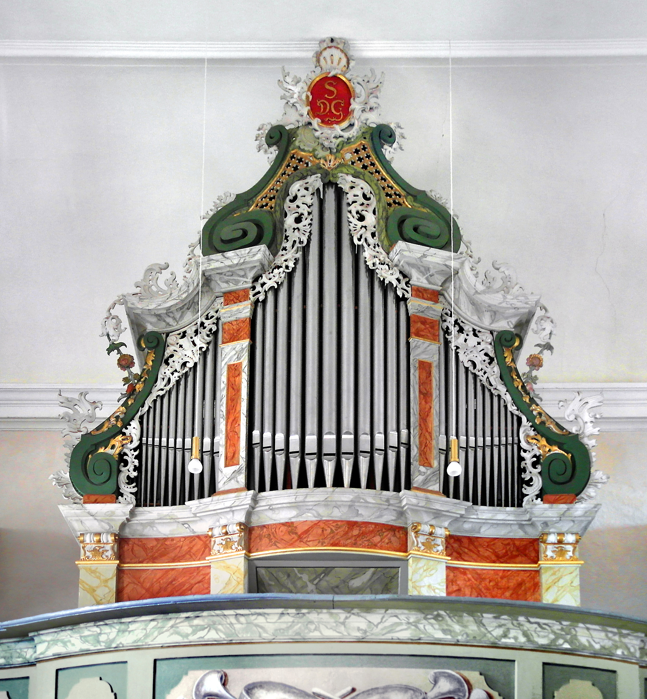 18.04.2016 01809 Burkhardswalde (Müglitztal): Kirche (GMP: 50.921267,13.858845) 1444 ersterwähnt und um 1523 erweitert. Innen 1764 Spätbarock erneuert. Johann Daniel Ranft aus Geising schuf die Orgel. Der Prospekt ist farbig, teilweise mit Marmorierungen, gefaßt. Zweigeschossige, mit Grisaille-Malerei geschmückten Emporen. [SAM4456.JPG]20160418130DR.JPG(c)Blobelt